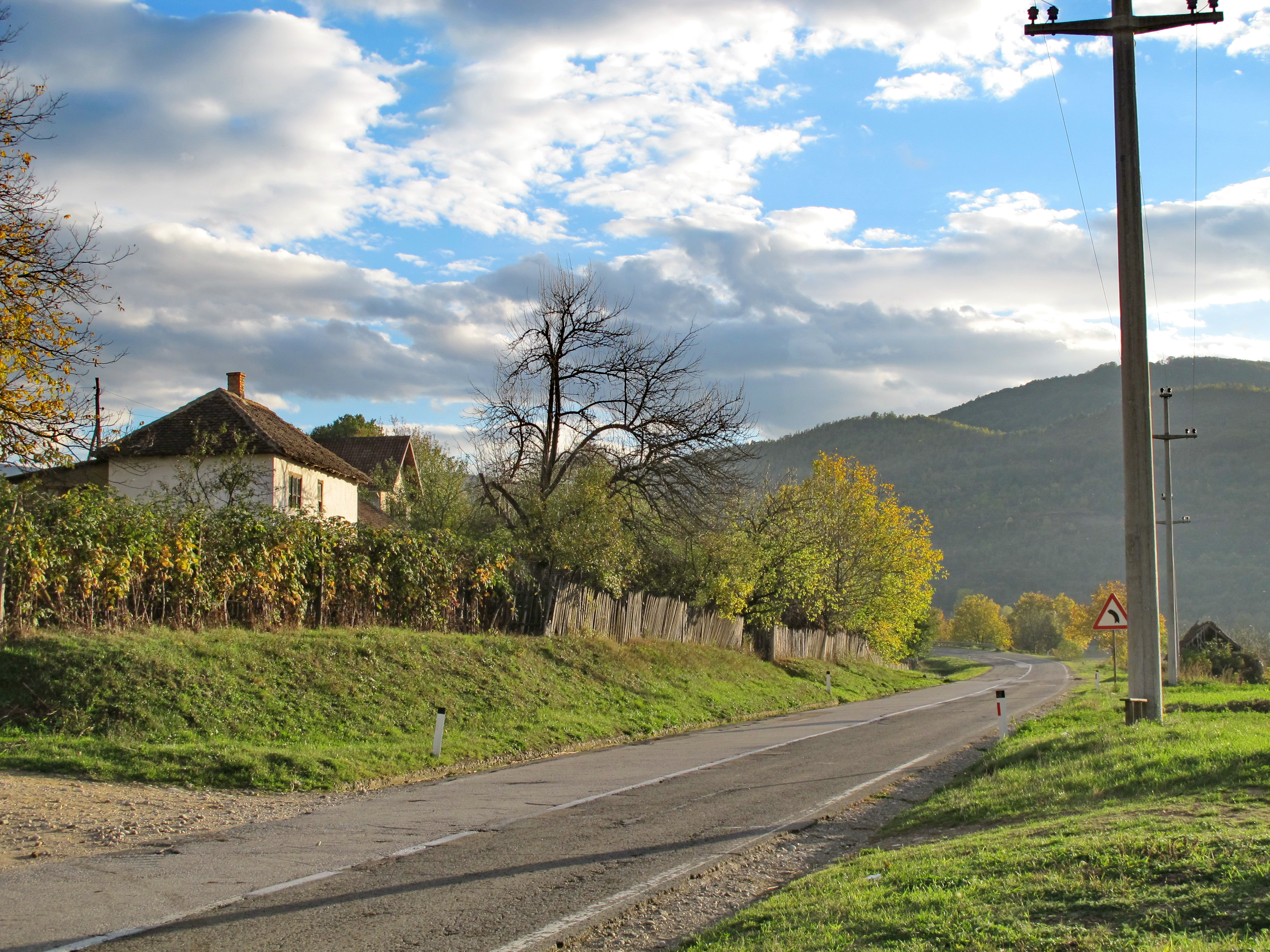 Дрлаче.